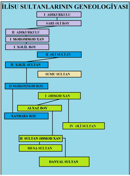 İlisu sultanlarının geneologiyası